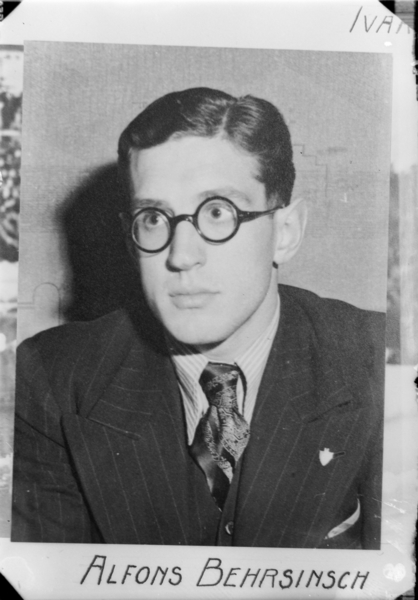 Alfons Bērziņš, latvisk skøyteløper, europamester 1939